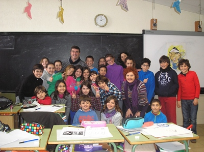 Al terminar el taller en Aula Balear